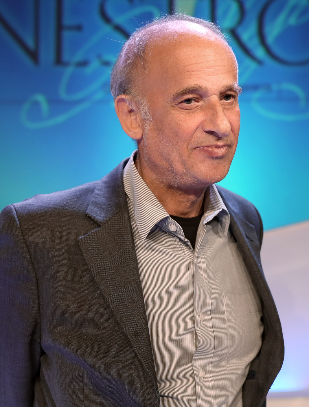 Luc Bondy - Nestroy-Theaterpreis 2013 in der Halle F der Wiener Stadthalle (Wien, Österreich).